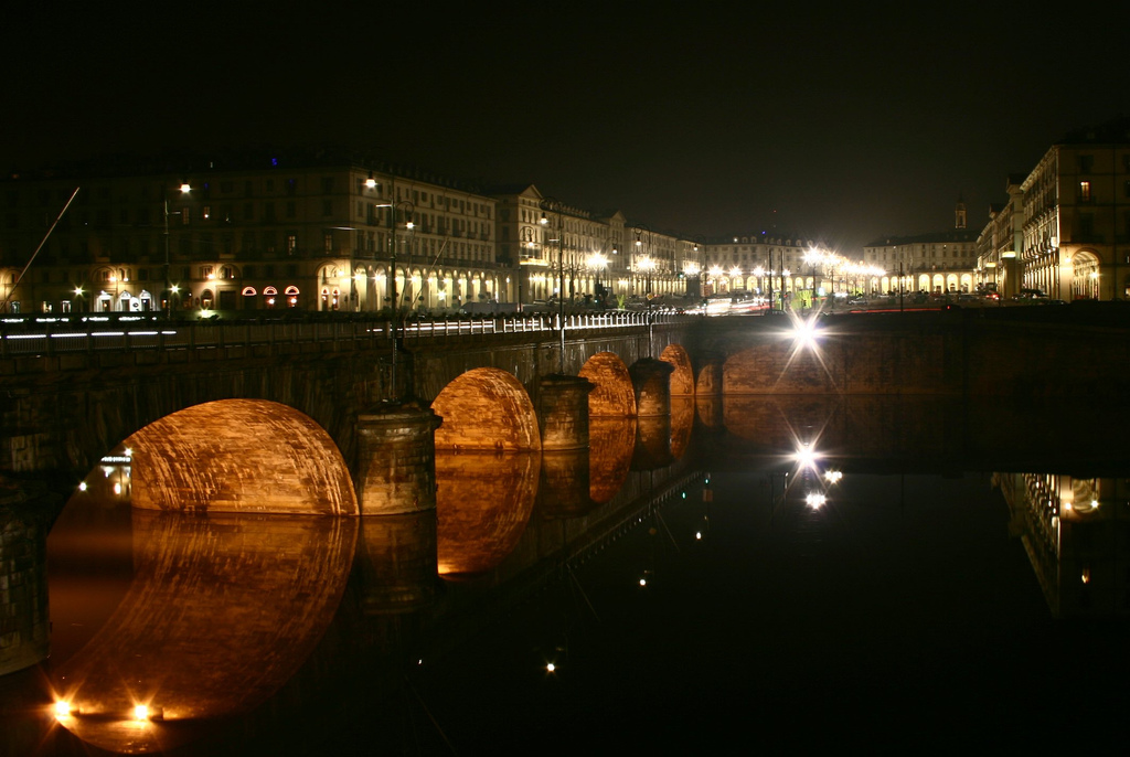 Il ponte Vittorio Emanuele I a Torino.